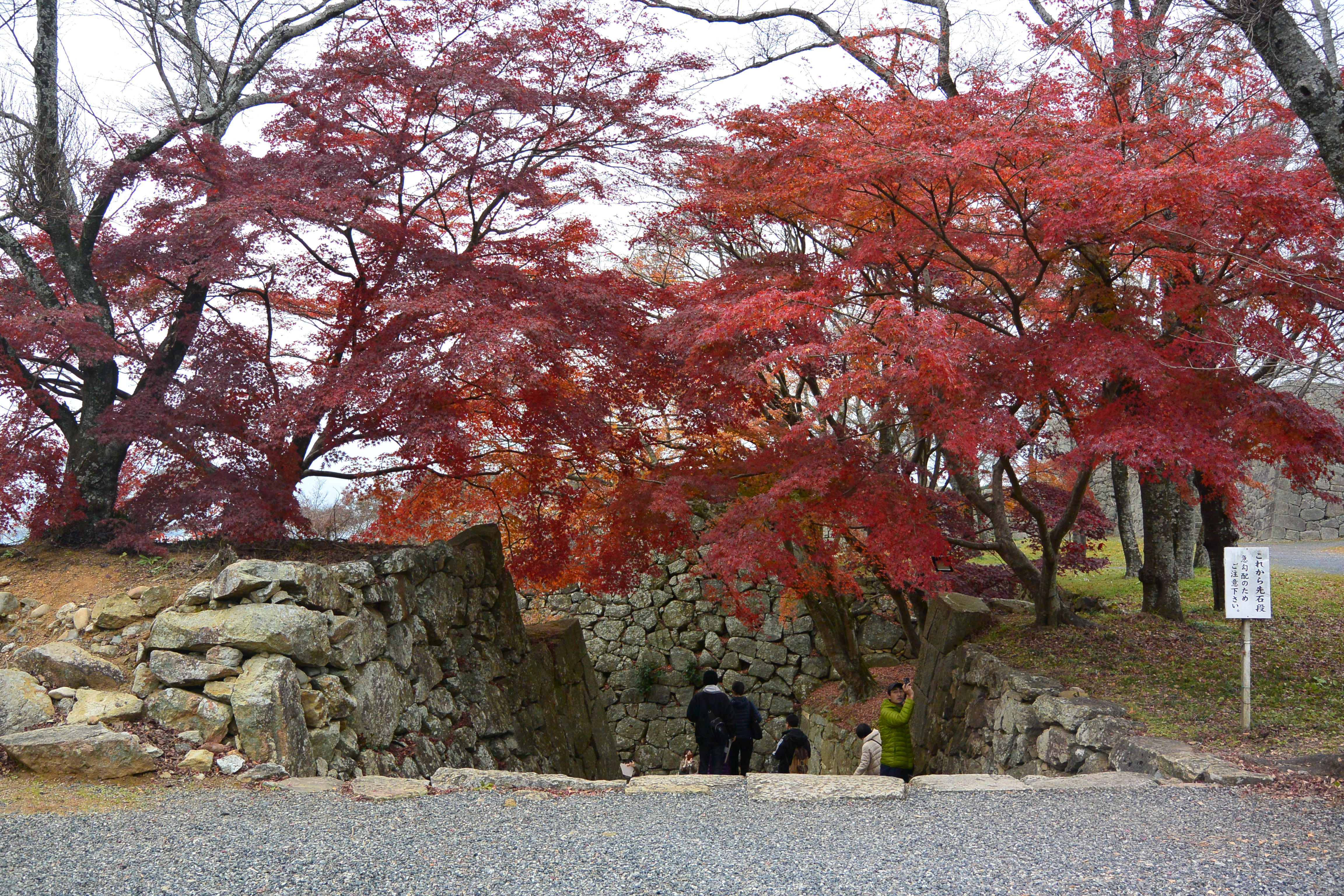 津山城本丸の紅葉